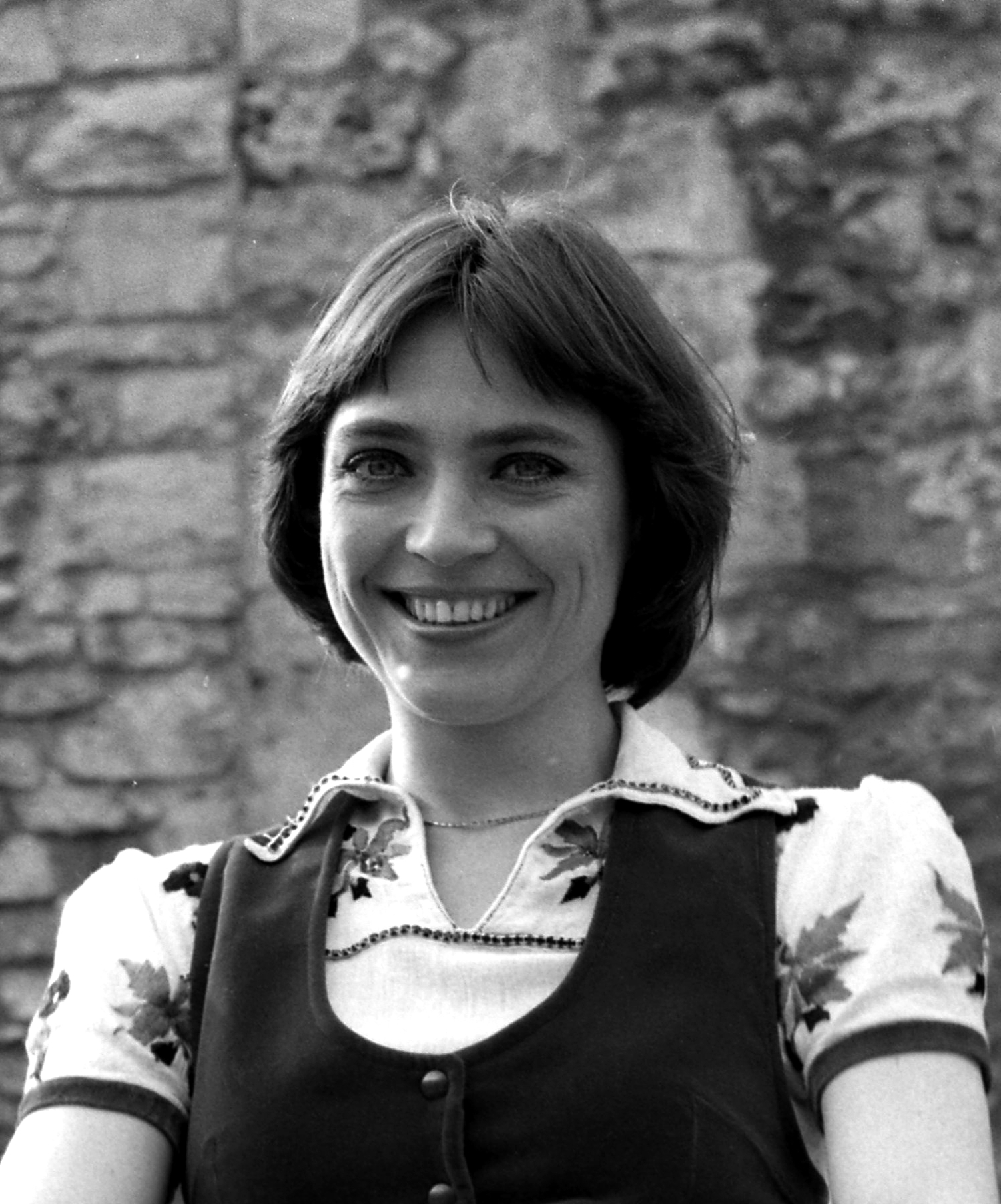 Kovács Kati Kossuth-díjas és Liszt Ferenc-díjas magyar előadóművész, énekesnő, dalszövegíró, színésznő. (1976)